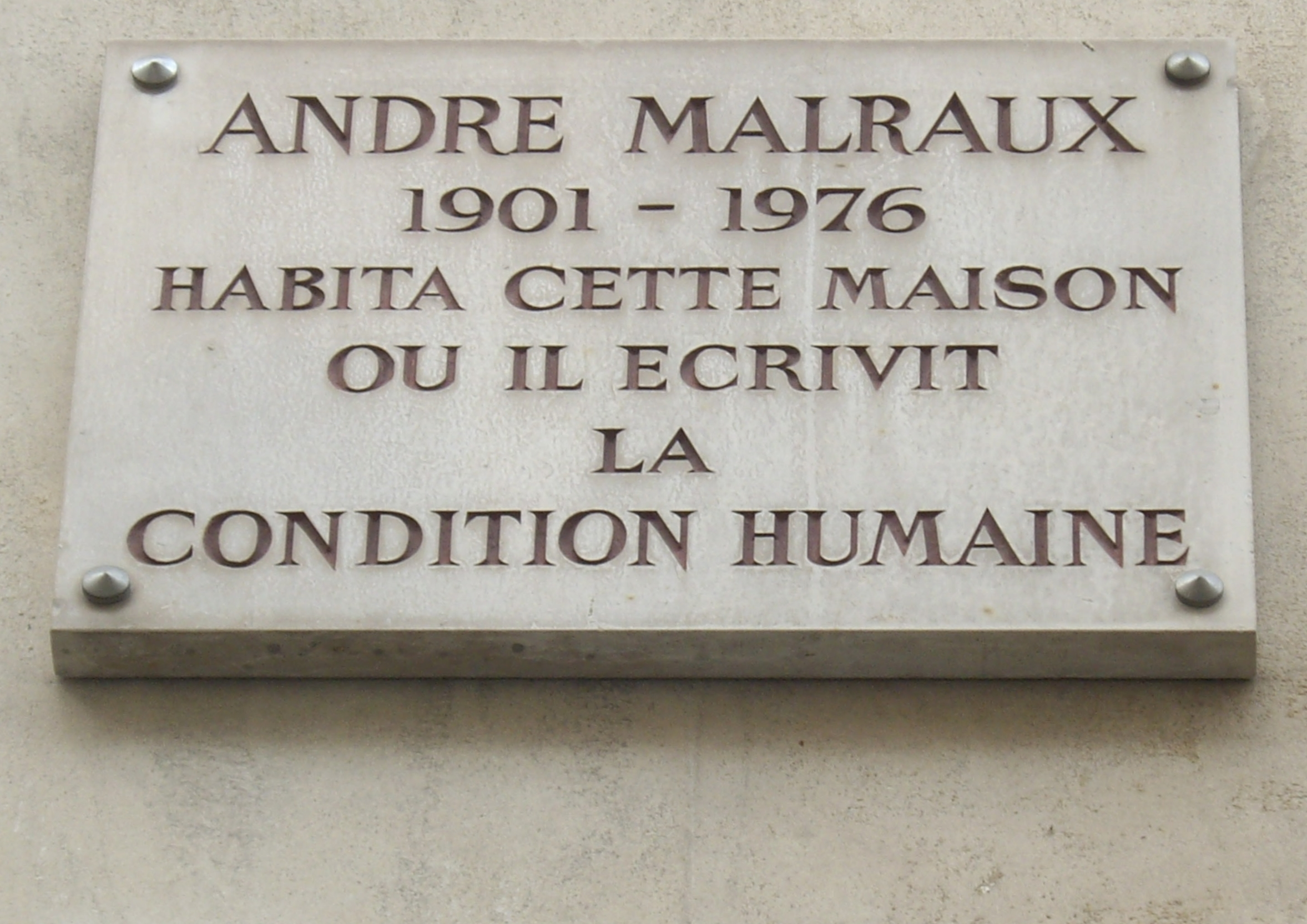 Plaque apposée au n° 44 de la rue du Bac, Paris 7e, où habita André Malraux (1901-1976) et où il écrivit La Condition humaine.